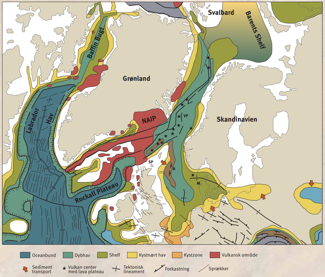 Palæogeografisk kort over Nordatlanten for ca. 54 mio år siden